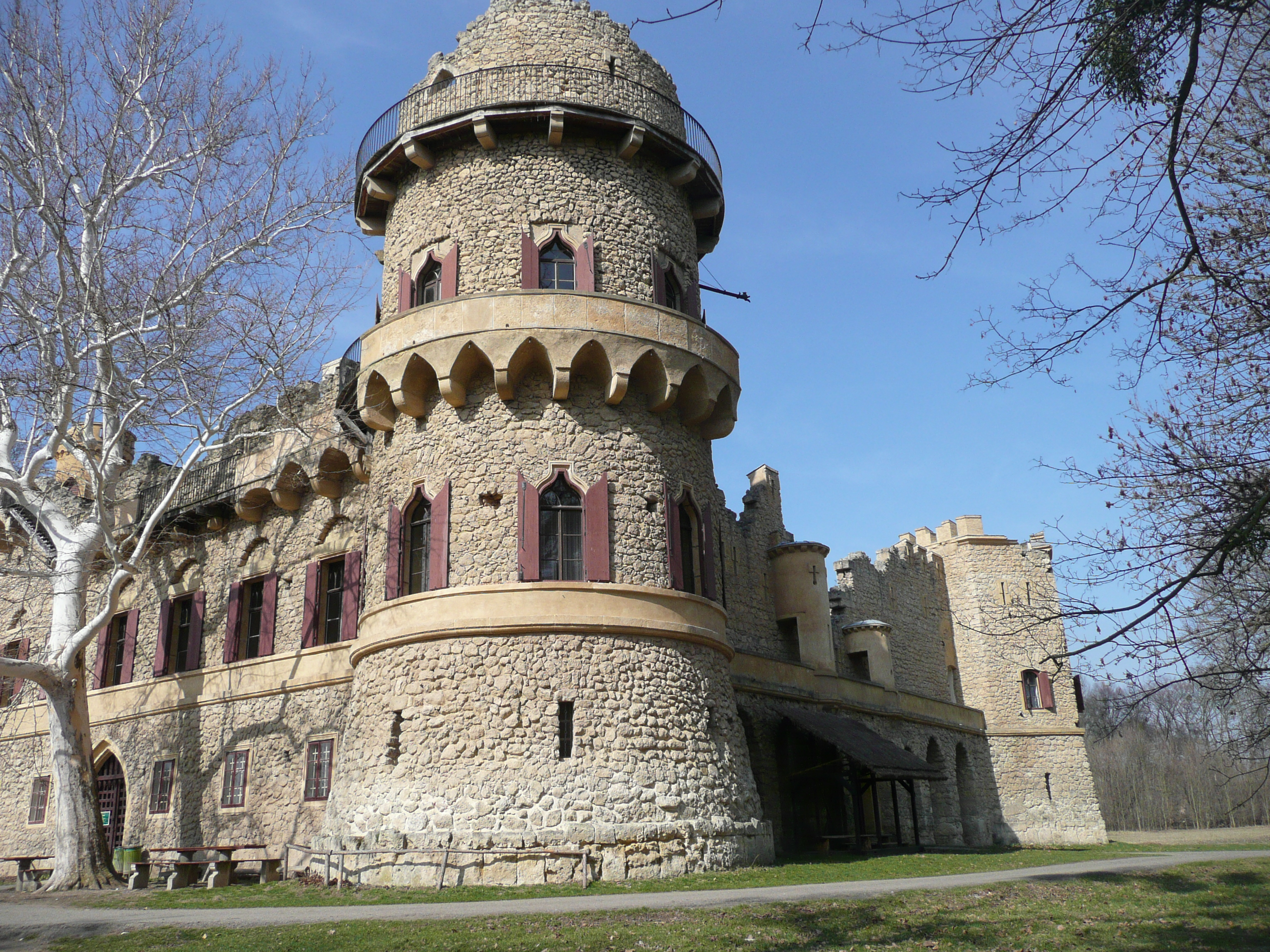 Zámek Janův hrad Podivín, Vlčí louka 348, Podivín